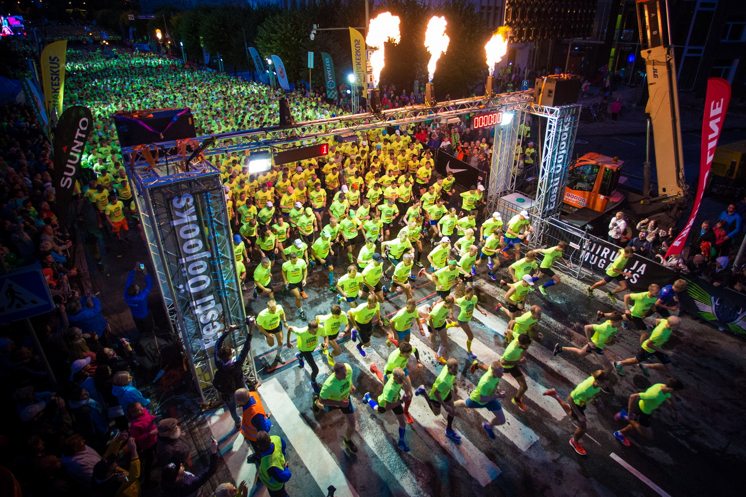 Ööjooks